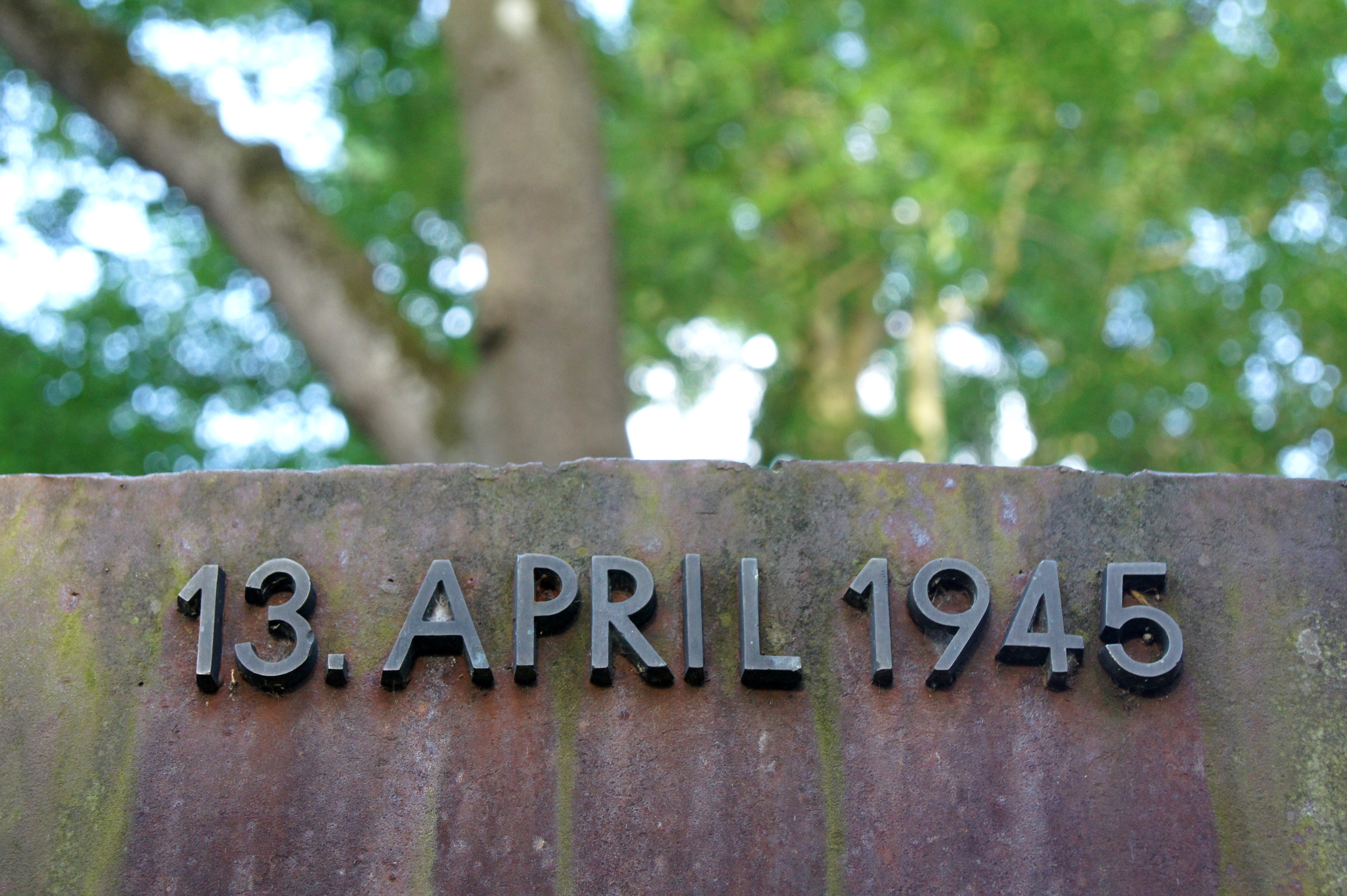 Das Mahnmal für die ermordete Widerstandsgruppe Kirchl-Trauttmansdorff im St. Pöltner Hammerpark, Schriftzug am Eingang mit Datum der Ermordung